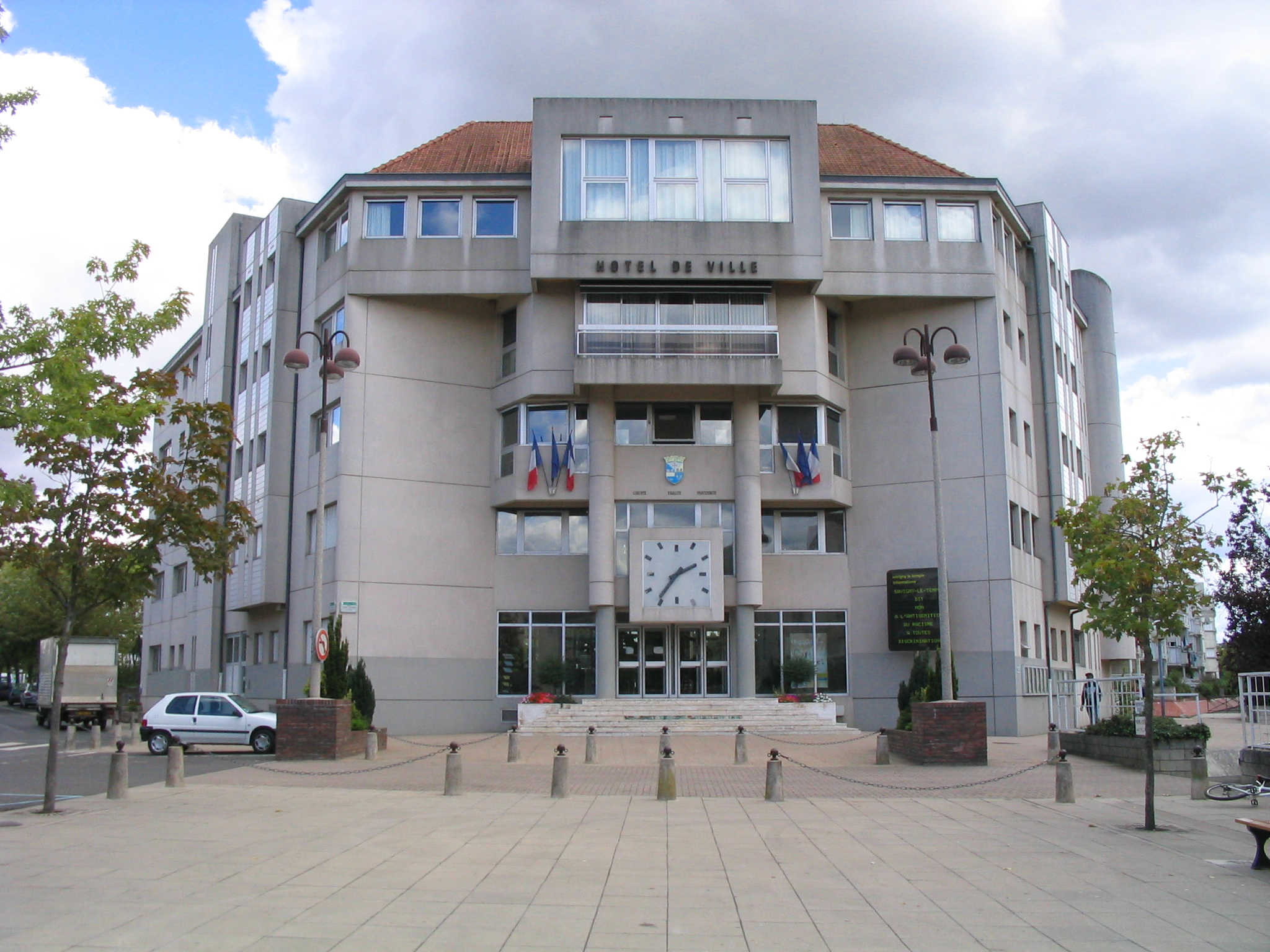 L'hôtel de ville, avenue Léon Blum, dans le centre-ville de Savigny-le-Temple. City hall of Savigny-le-Temple.